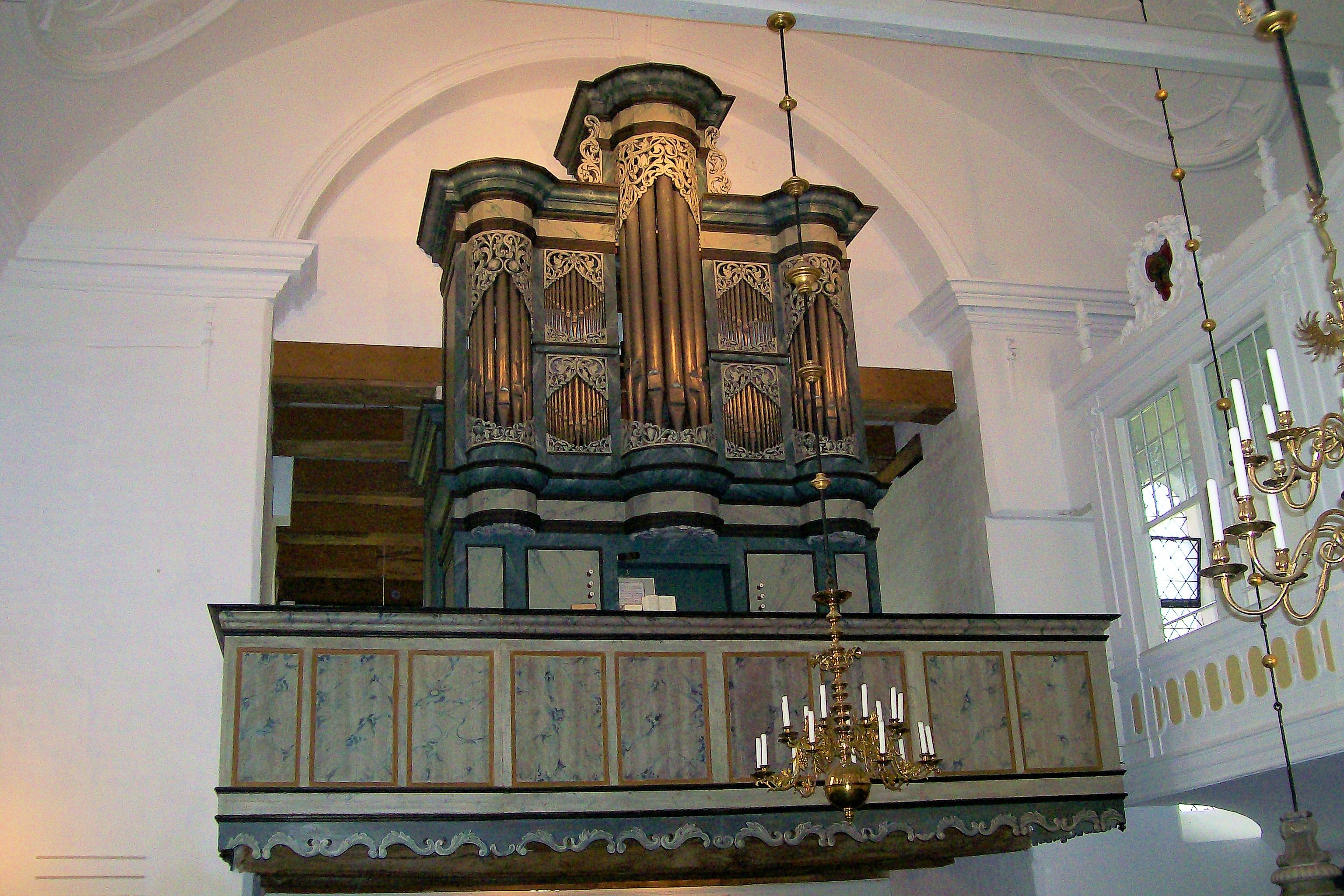 St. Georg church in Lübeck, Schleswig-Holstein, Germany, organ